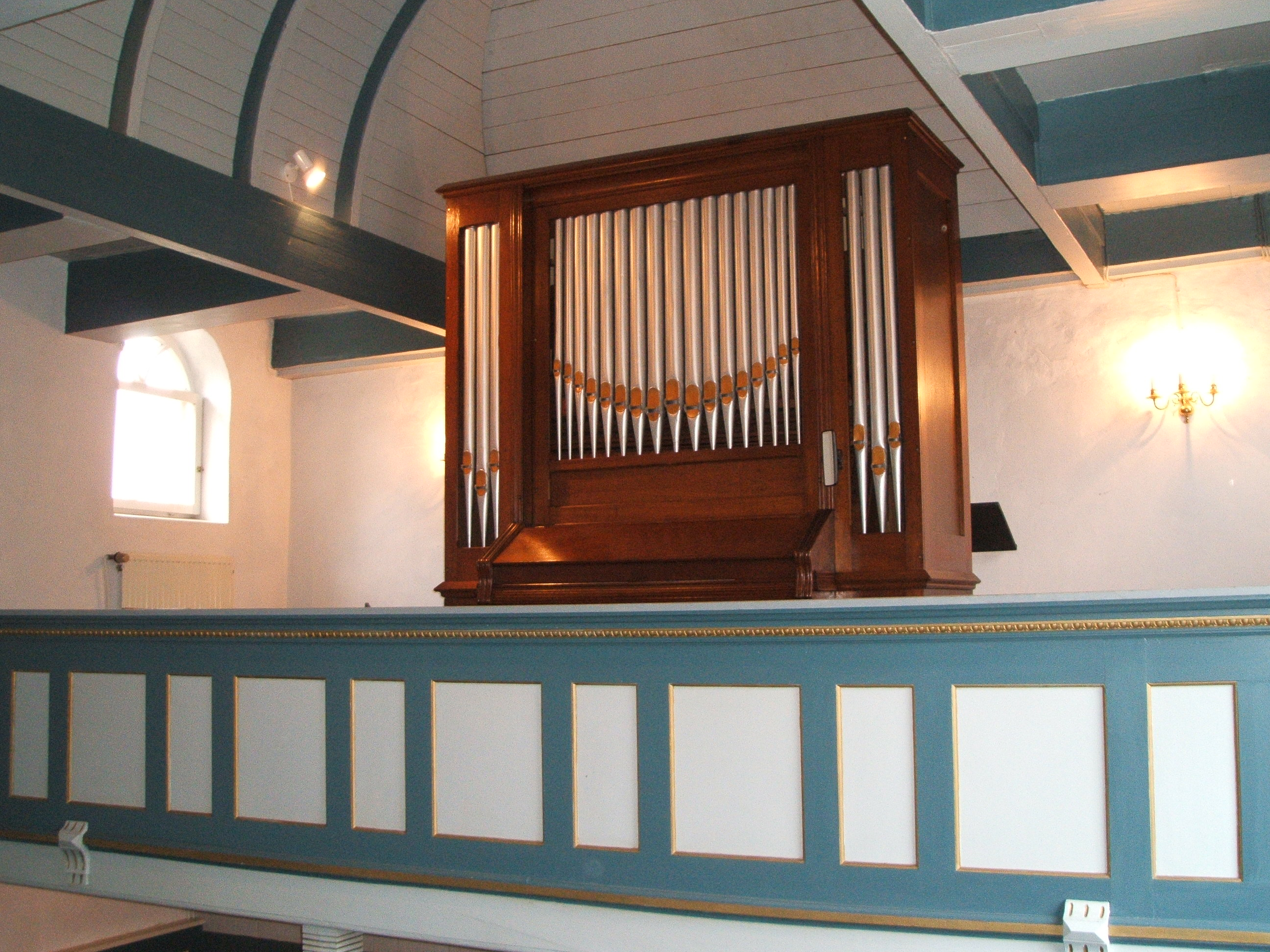 Vocalion der Alten Kirche Wybelsum, Emden, Ostfriesland